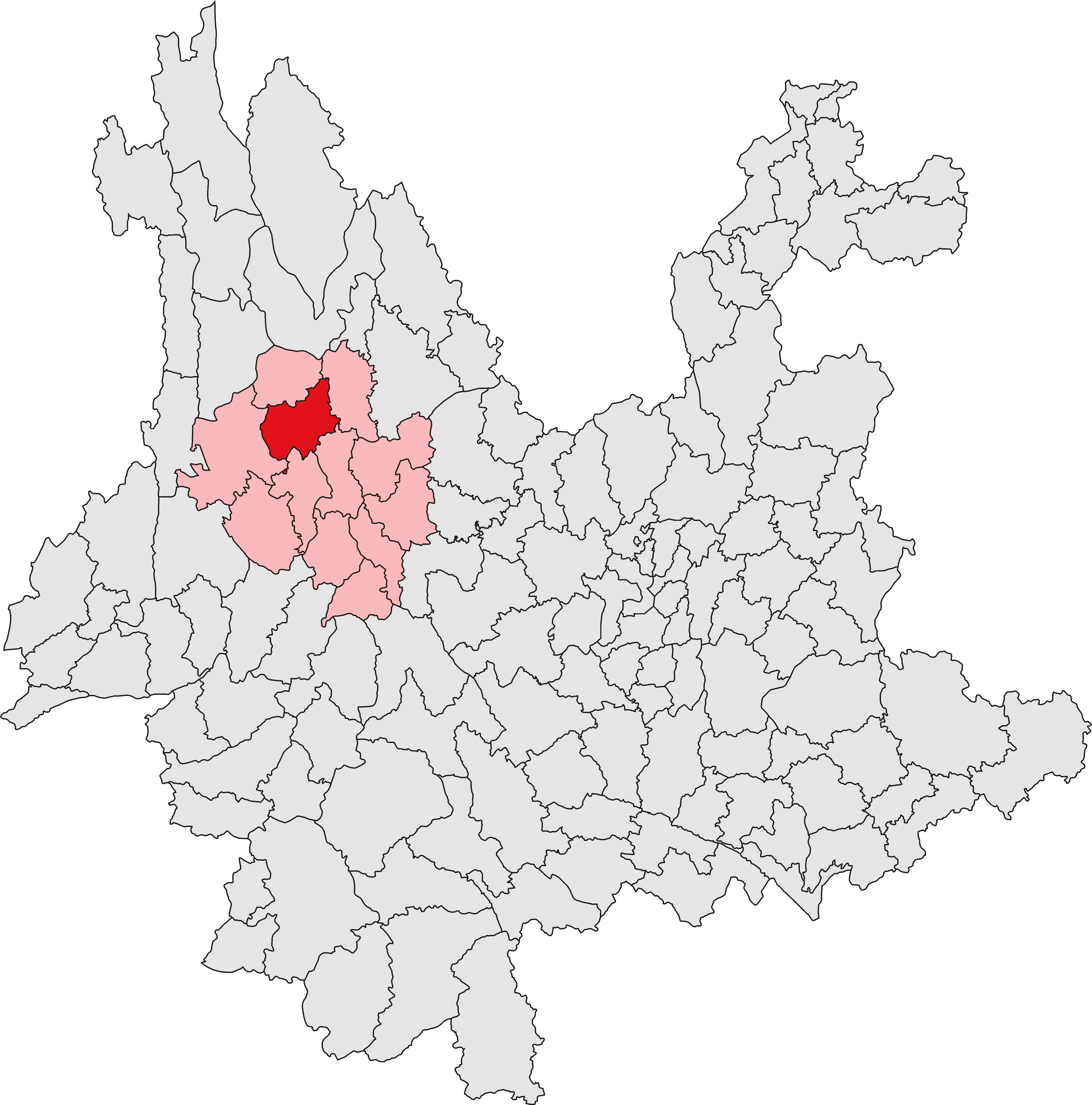 中文（中国大陆）: 洱源县位置图